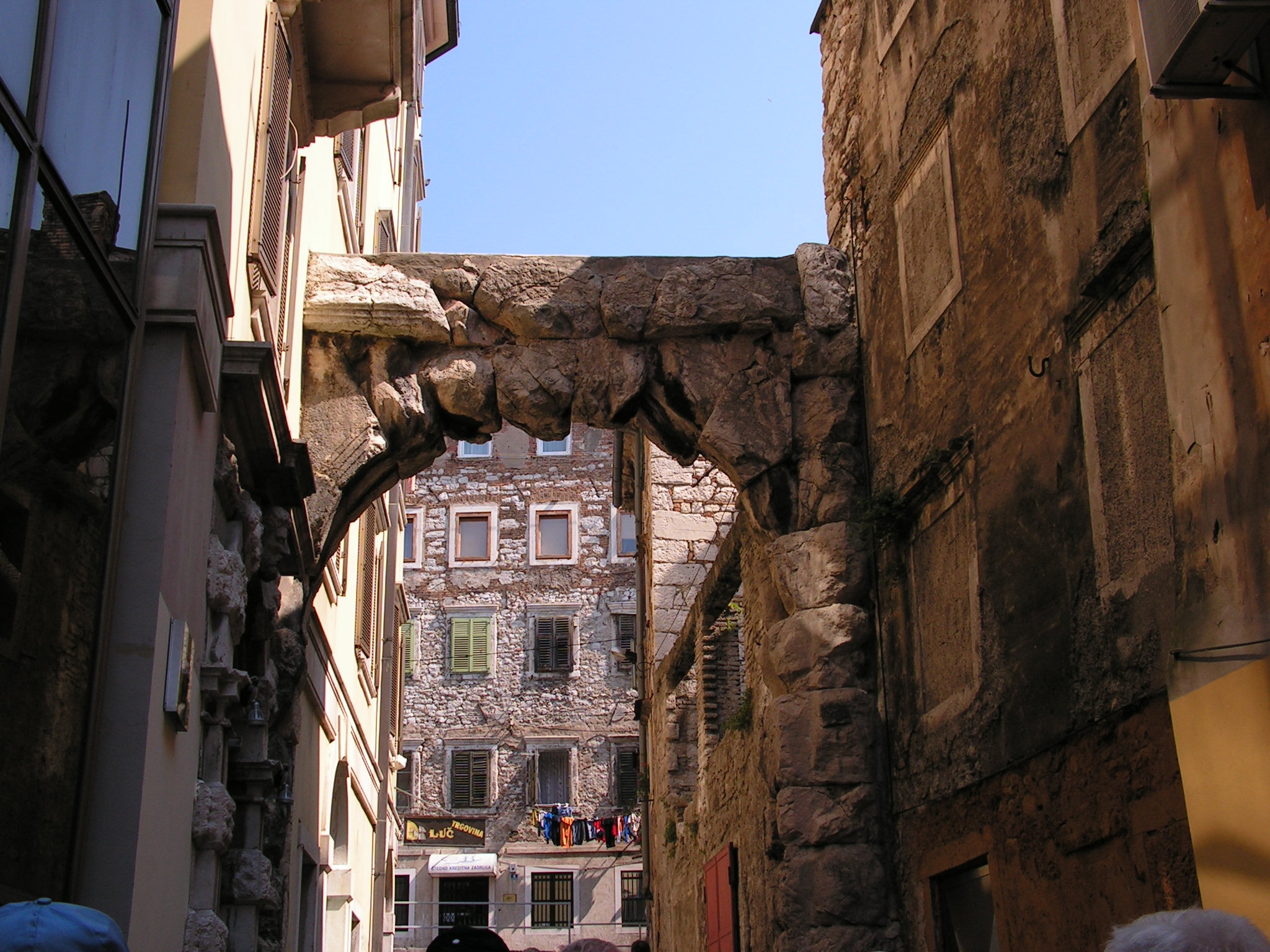 Brama rzymska - Rijeka